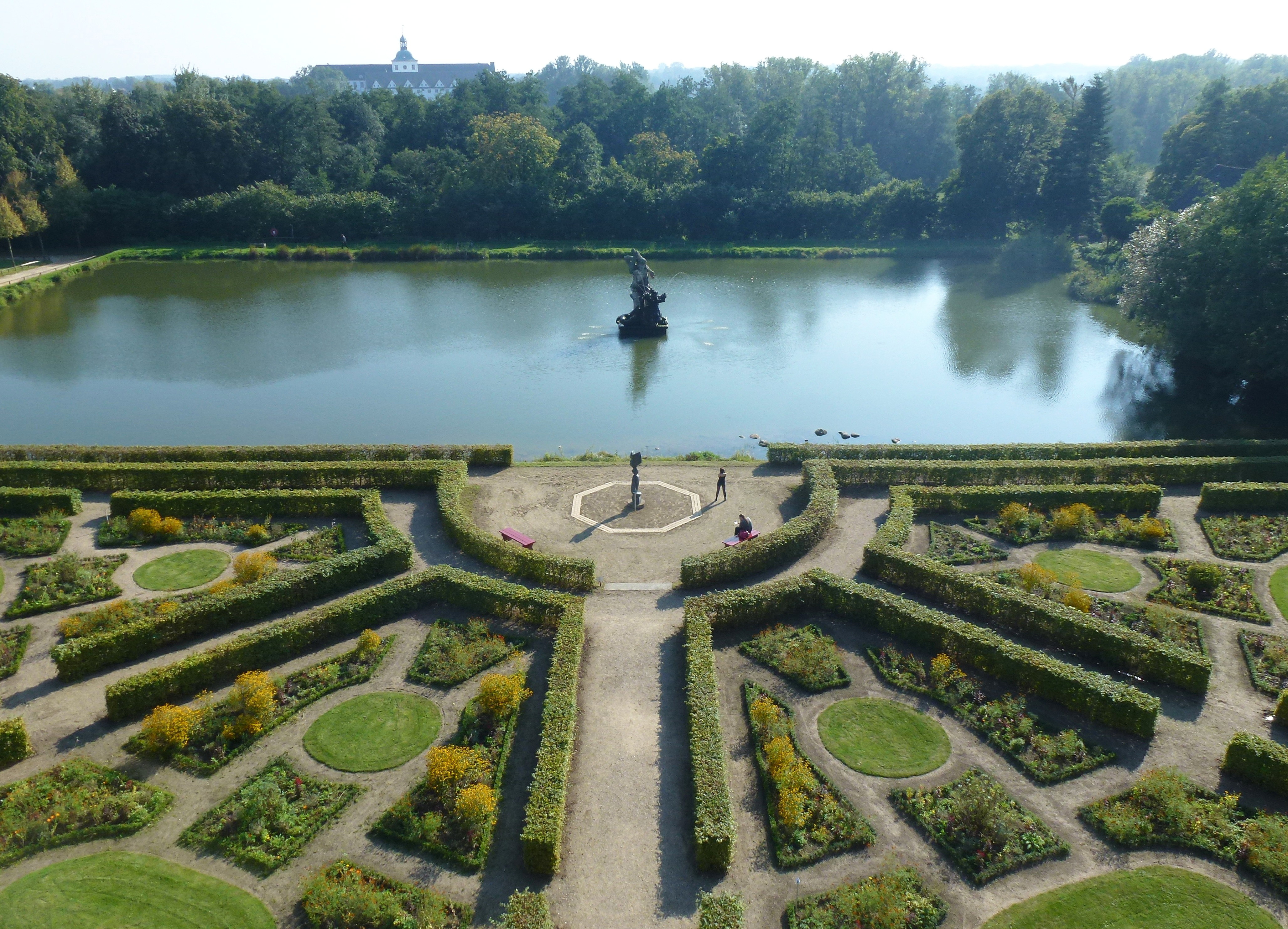 Gottorps barockträdgård